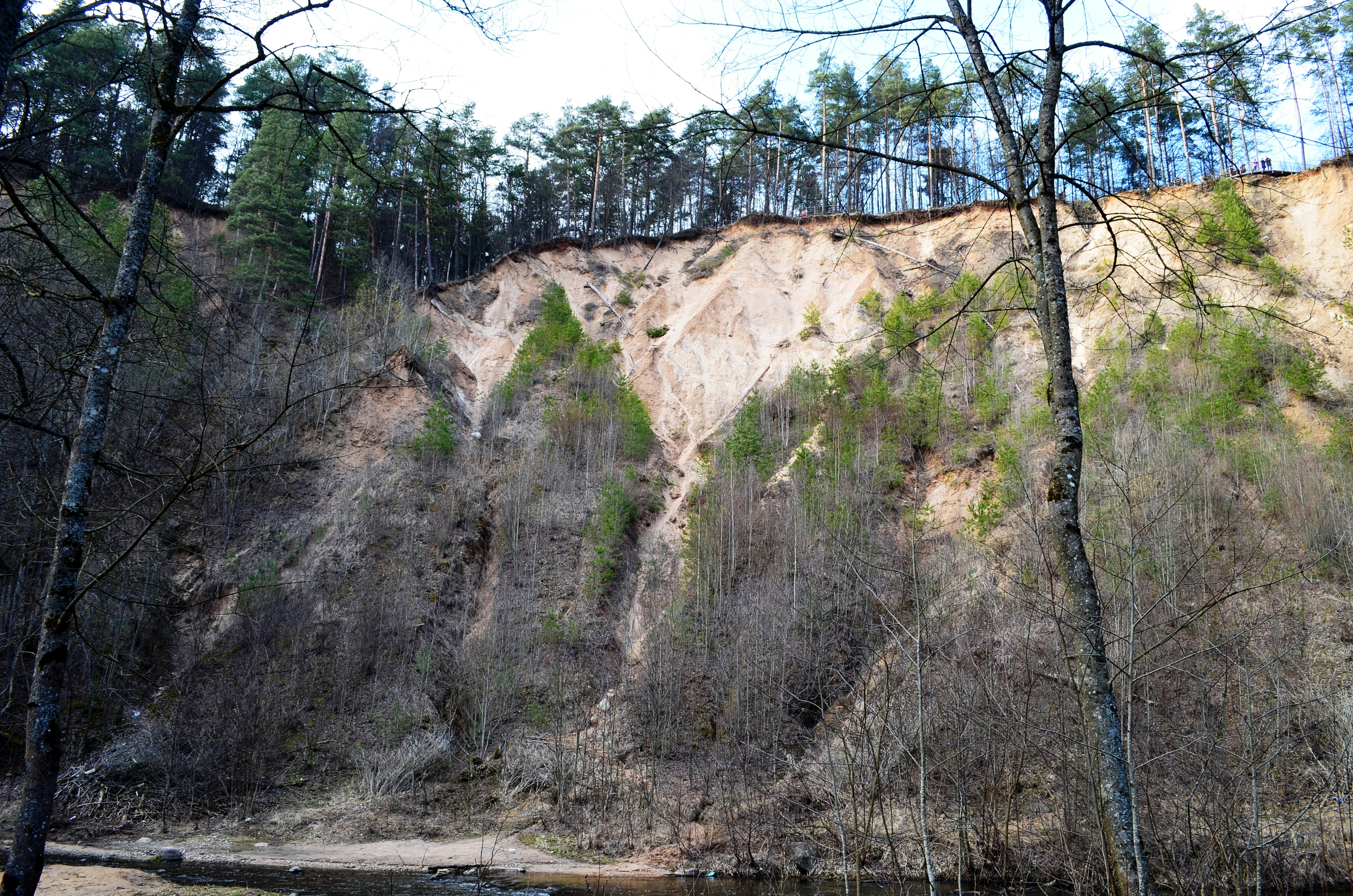 Pūčkorių atodanga, Pūčkoriai, Vilnius